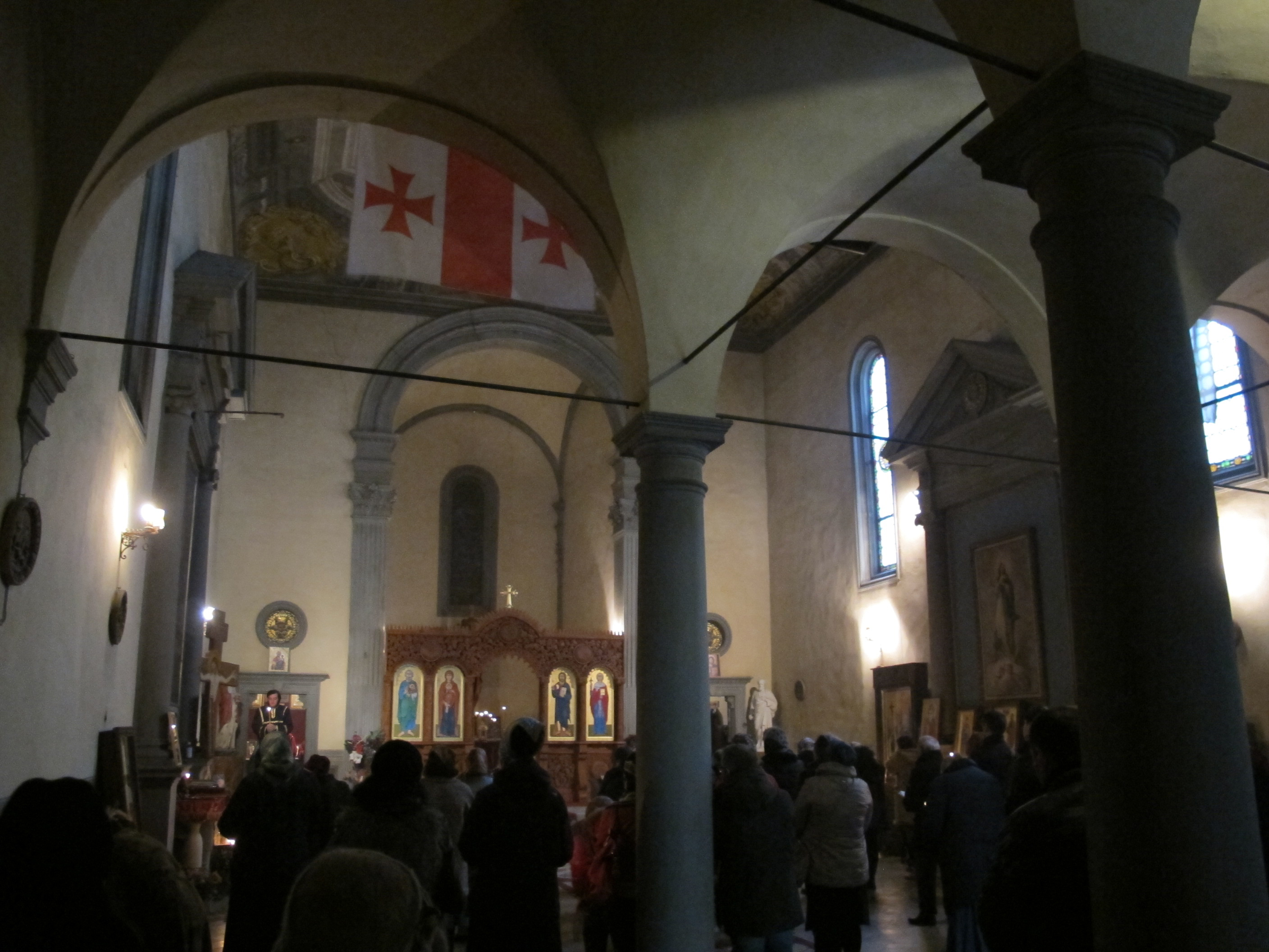 Chiesa di s.elisabetta delle convertite, int.